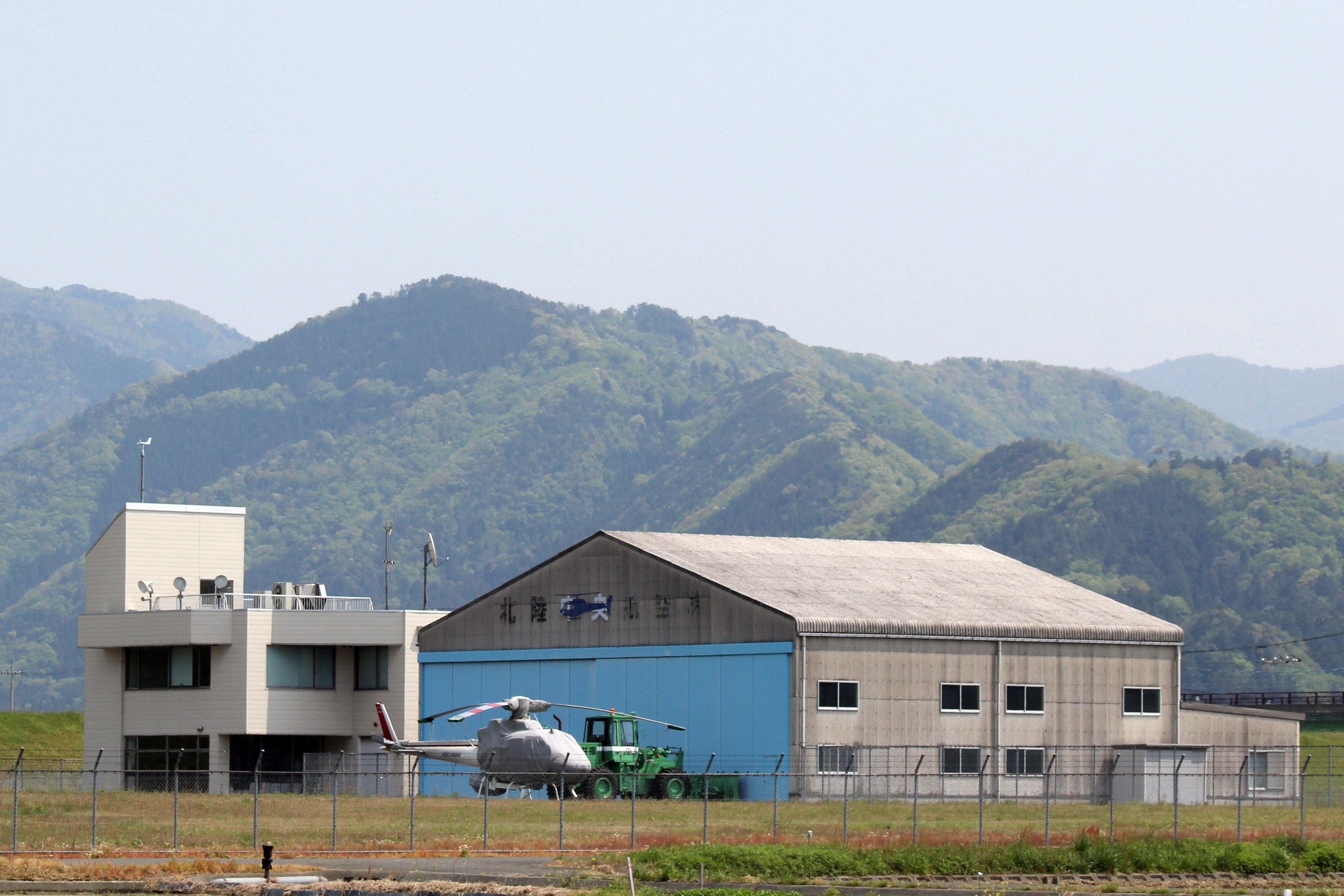 若狭ヘリポート 全景